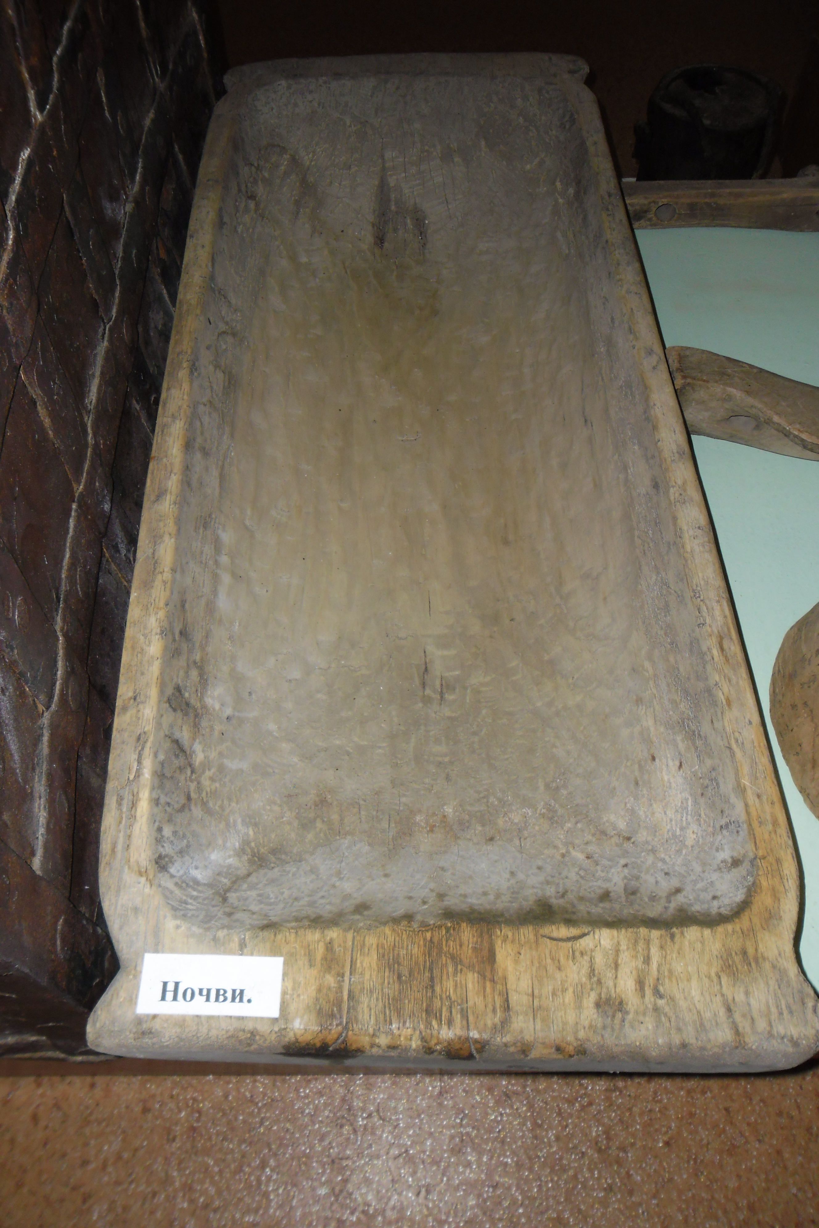 Ночви